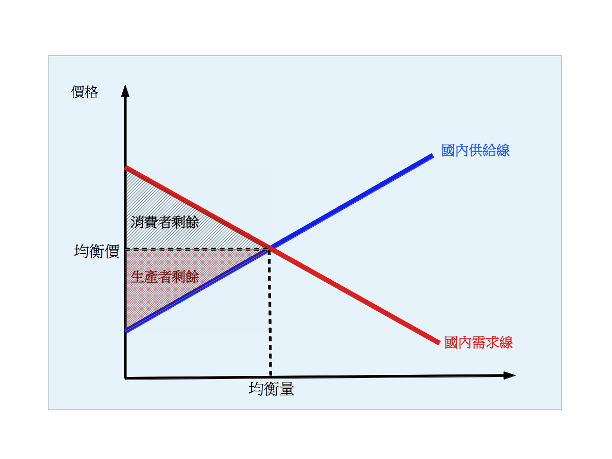 供需圖中生產者與消費者剩餘